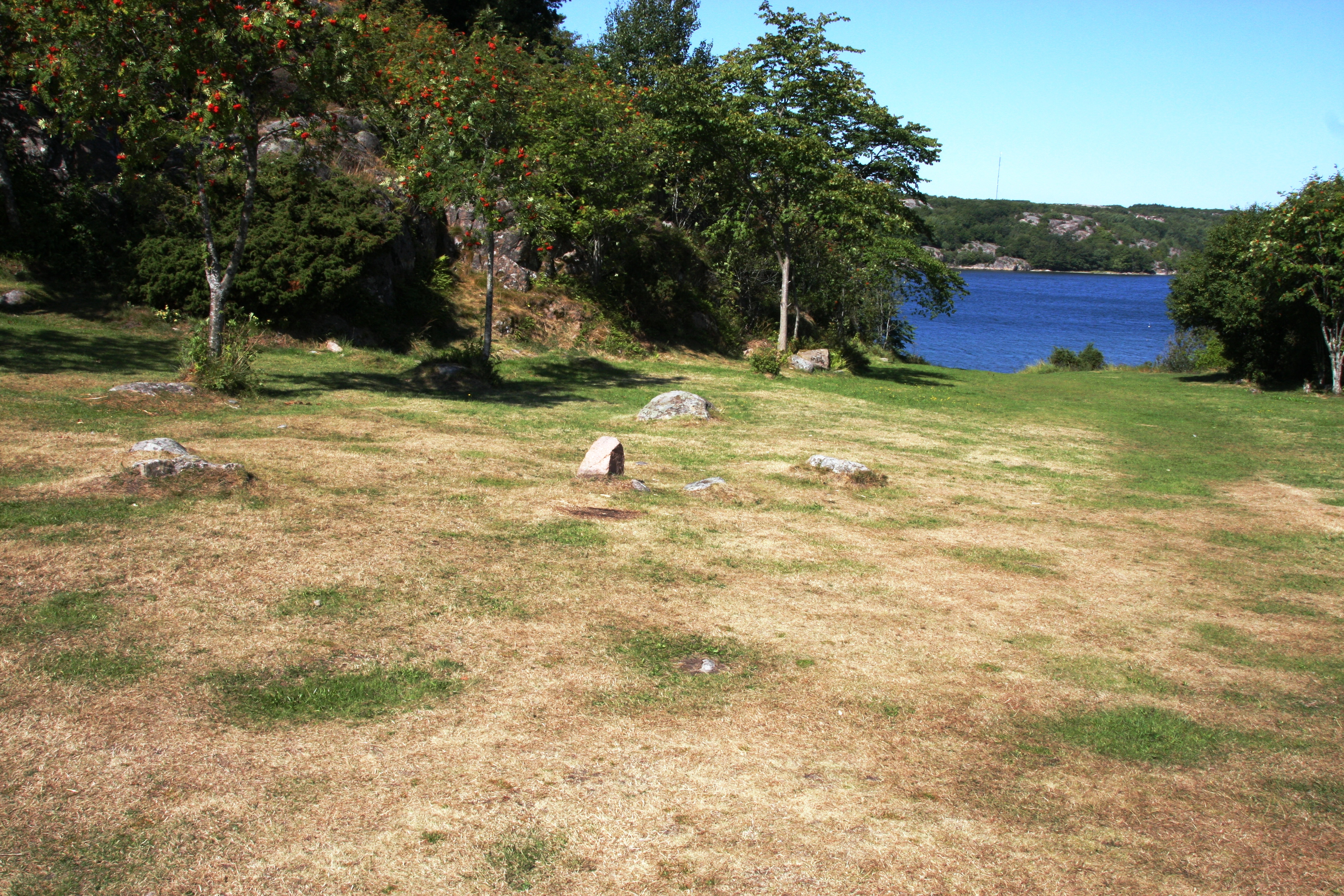 Hornburgs slottsruin i Kville socken, nära tätorten Slottet söder om Hamburgsund, Tanums kommun. Det här var ett centralt svenskt militärt knutpunkt, som fanns sig på högden inom 1400-1450-talet. Slottsborgen blev i senmiddelåldern angripit av norska styrkor, och reste sig alldrig igjen äfter attacken. Själva ruinen er enbart synlig som stensettingar i marken som anger murarna, men ställets idealiska belegenhet er enkelt att fatta.